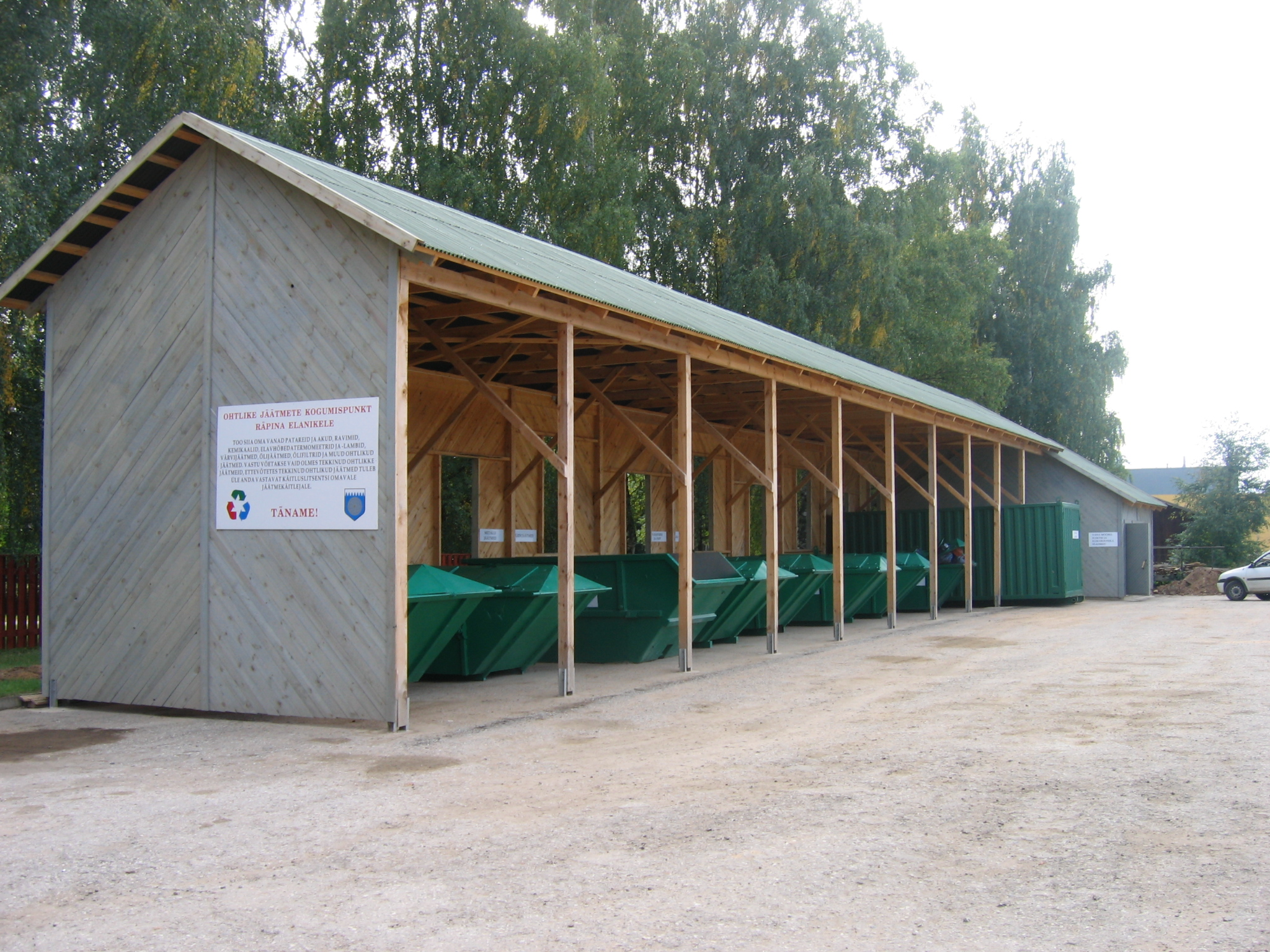 Räpina Jäätmejaam